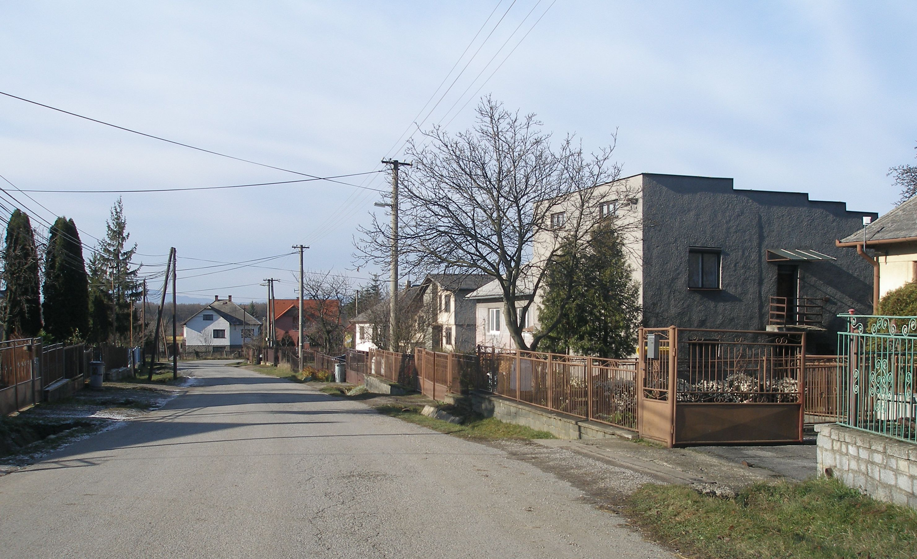 Obec Abranovce v okrese Prešov